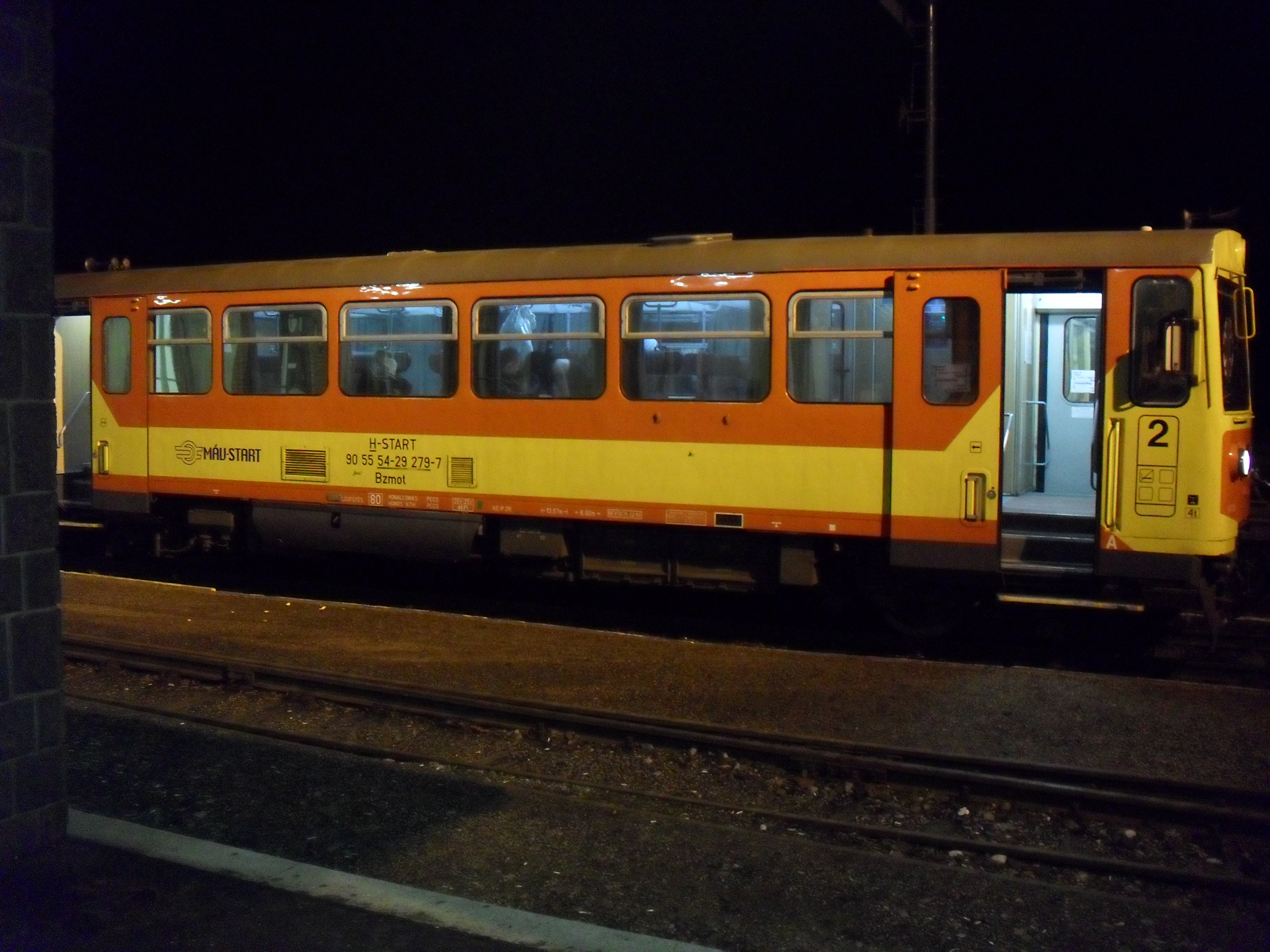 Szigetvár,željeznički kolodvor